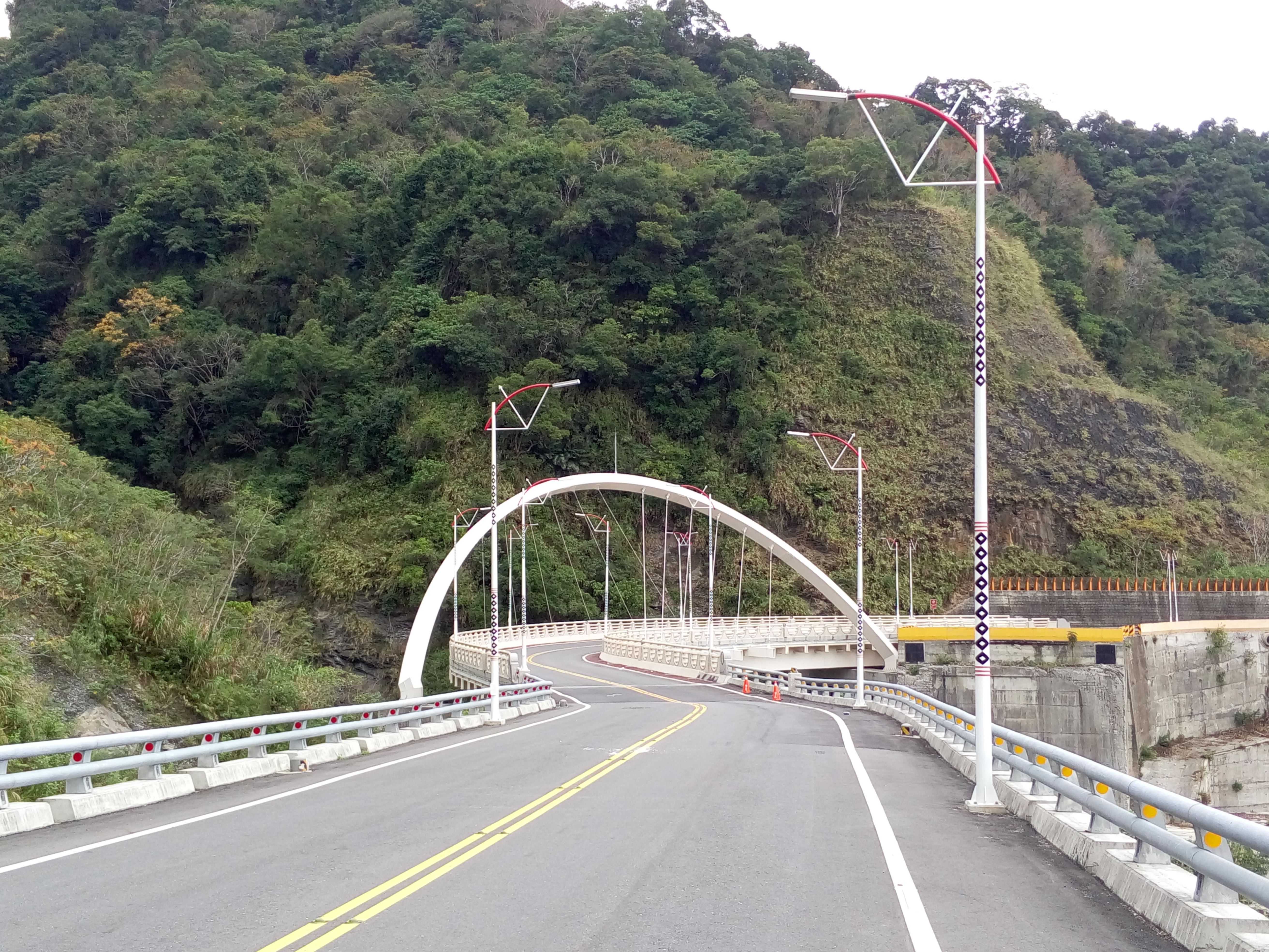 中文（台灣）: 於八八風災後重建的松楓橋